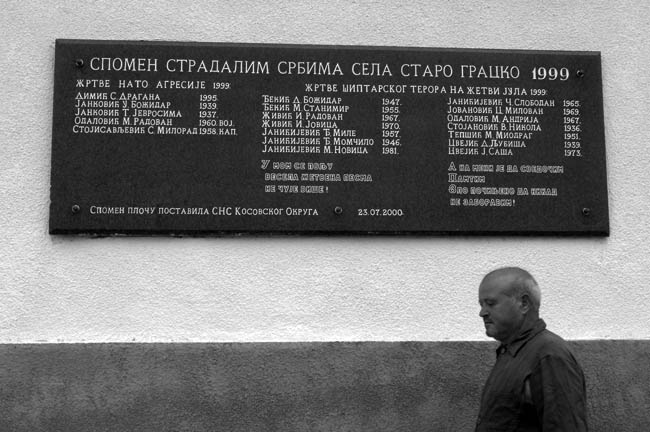 Косово и Метохија: Спомен плоча у селу Старо градцко где су албански терористи поубијали жетеоце српске националности.Фотографије из пројекта "Корени душе". Фото:Дарко Дозет